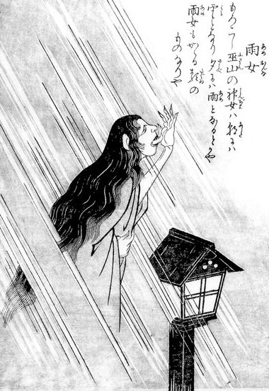 Ameonna (雨女, a female rain spirit) from the Konjaku Hyakki Shūi (今昔百鬼拾遺)